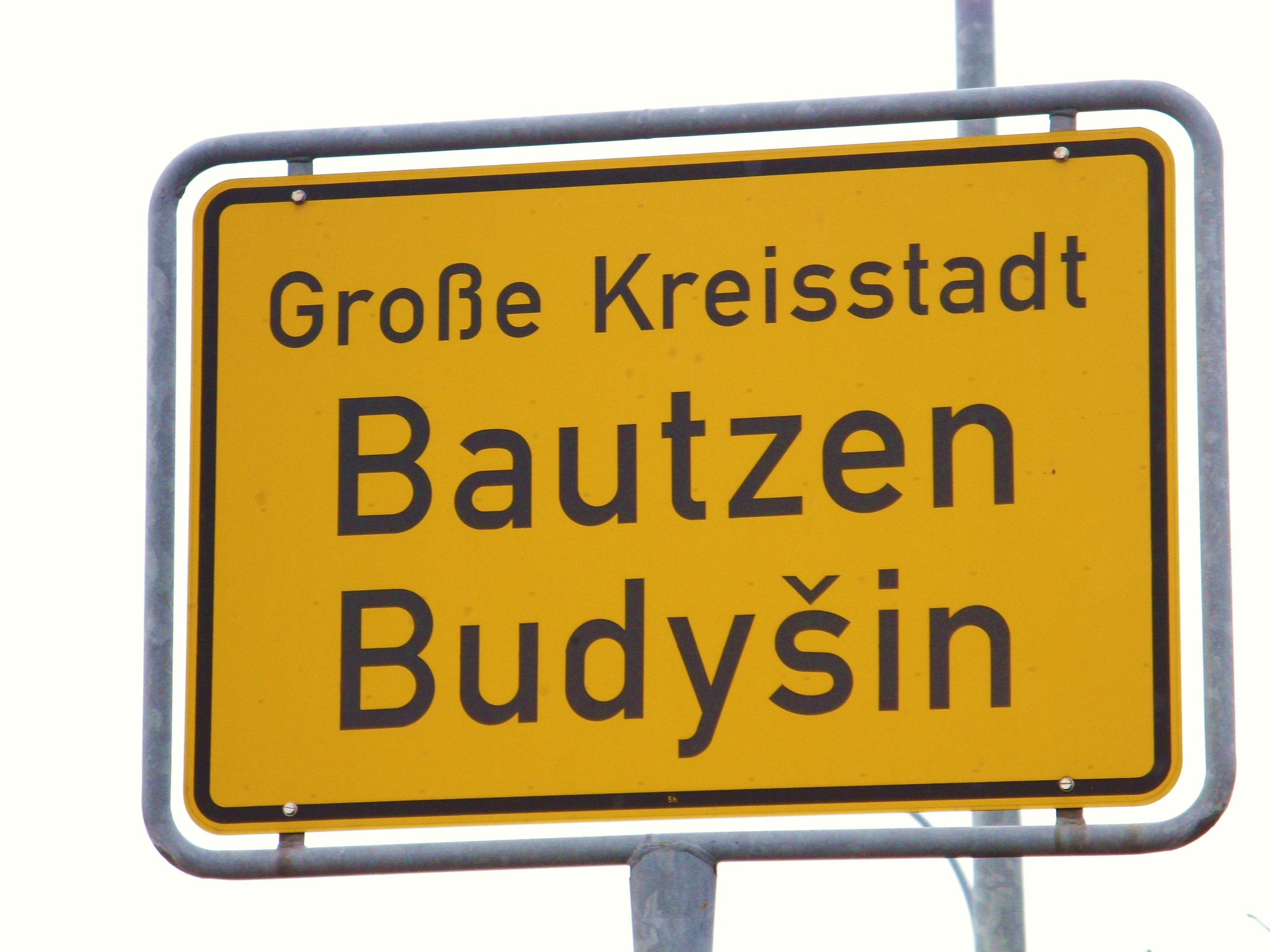 Zweisprachige Ortstafel von Bautzen. Hornjoserbsce: Dwurěčna měšćanska tafla w Budyšinje.